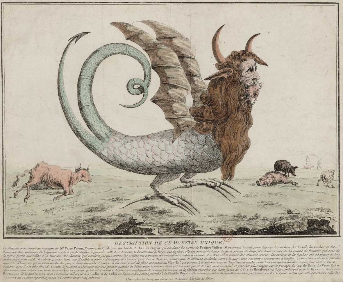 Description de ce monstre unique, eau-forte, 24 x 34,5 cm.